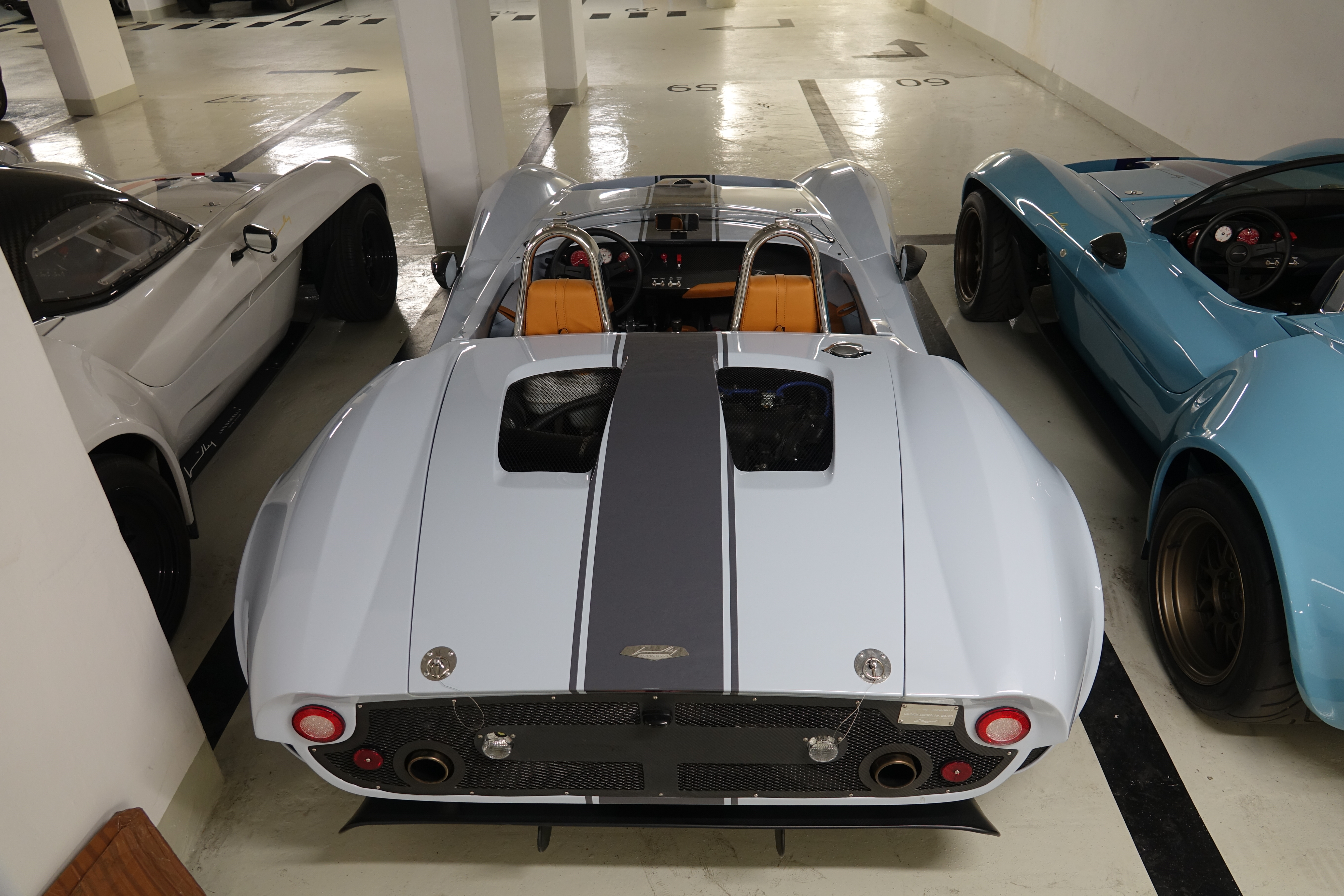 Jannarelly Design-1 à Paris